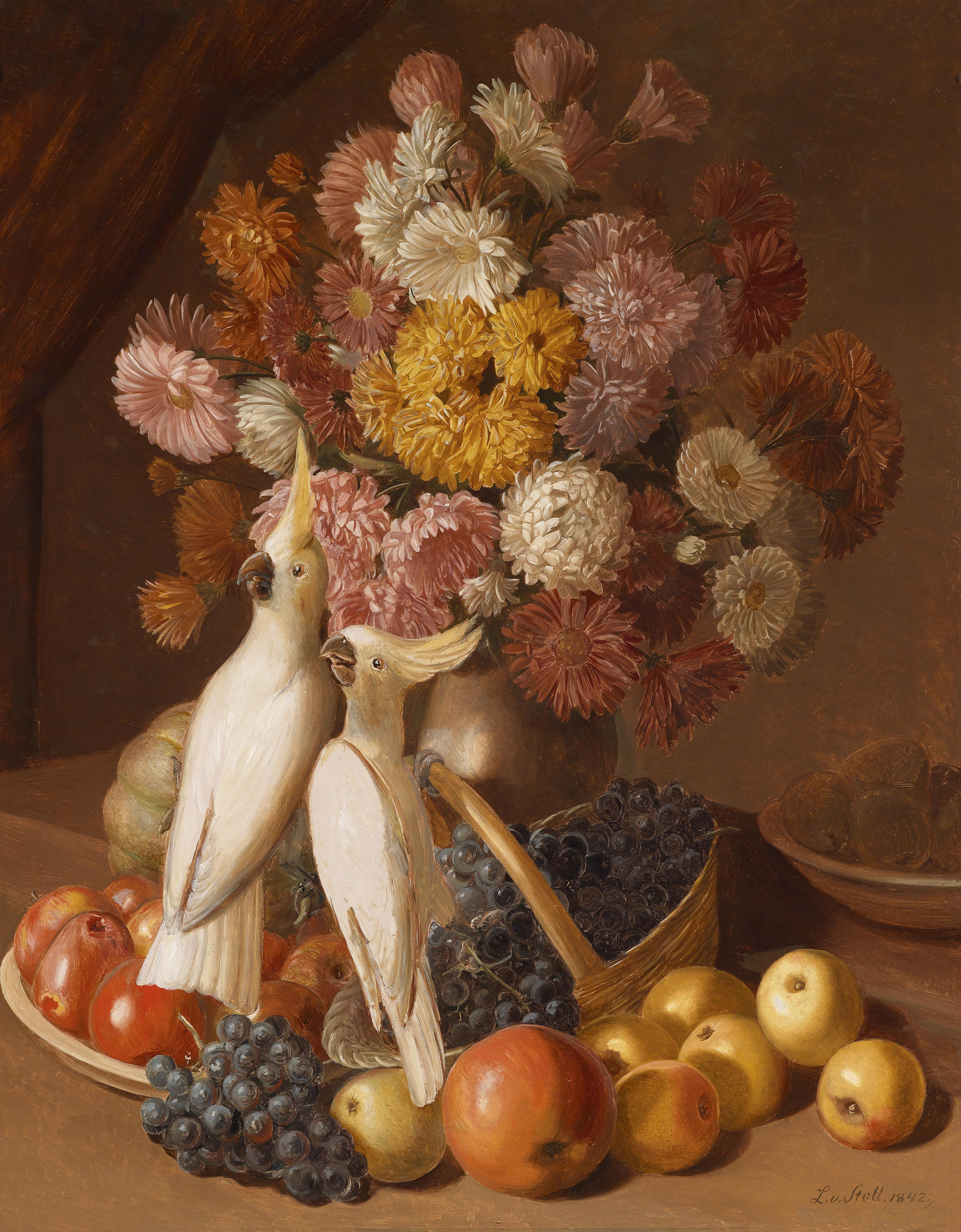 Lang